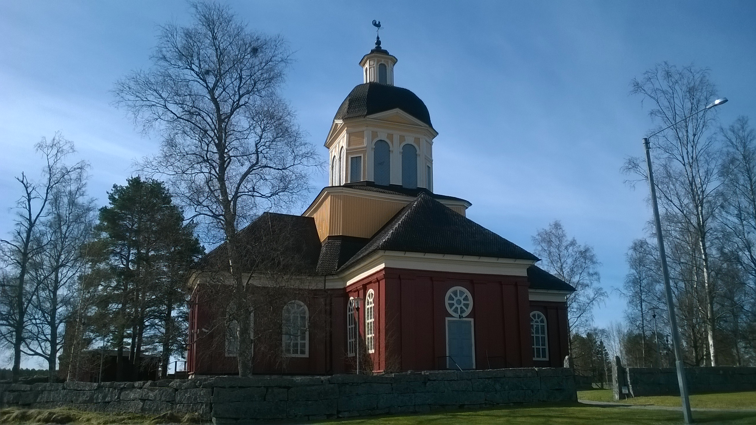 Luodon kirkko